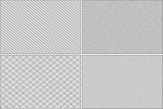 Rasterfolie, selbst erstellt